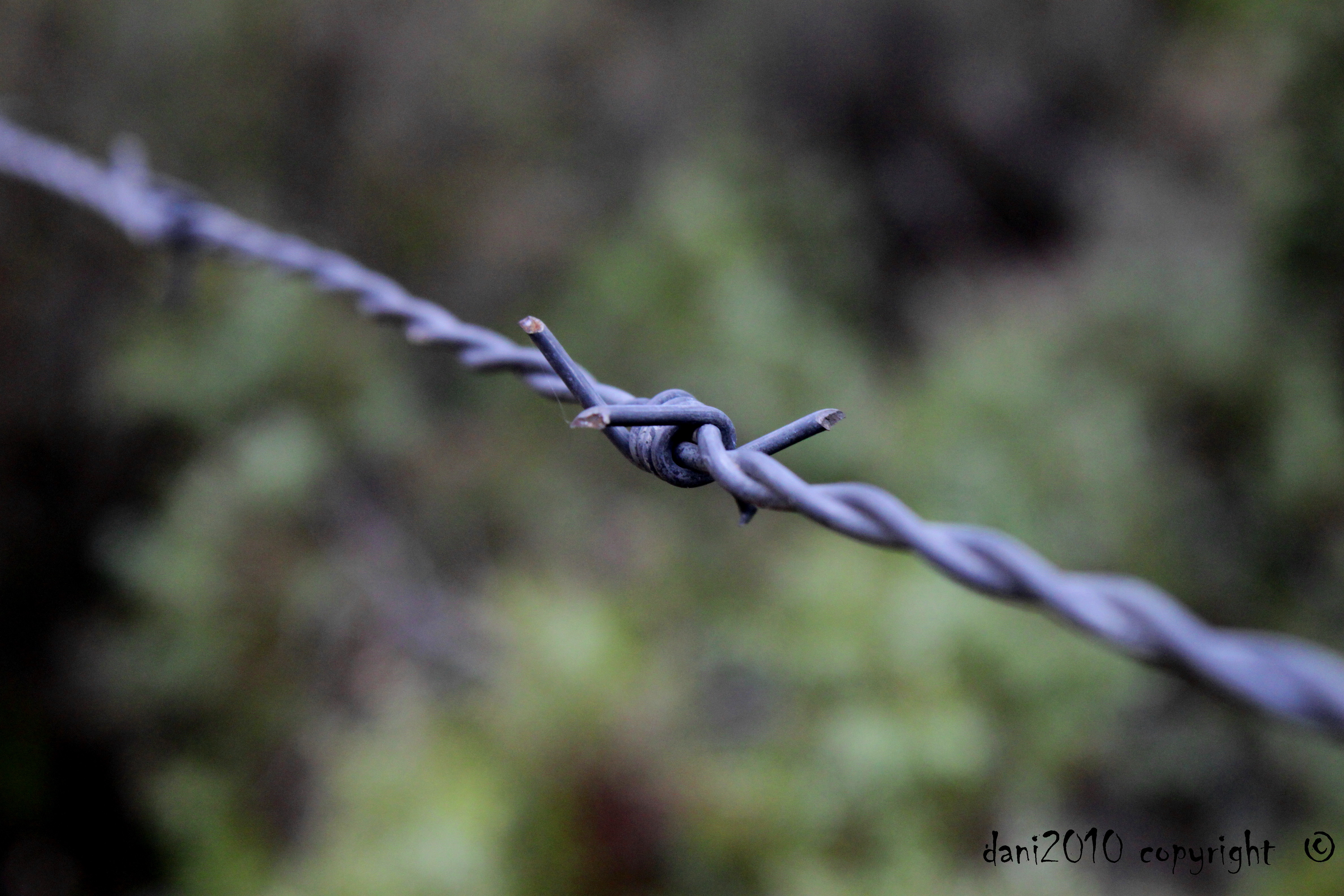 Cuidadico', cuidadico'...